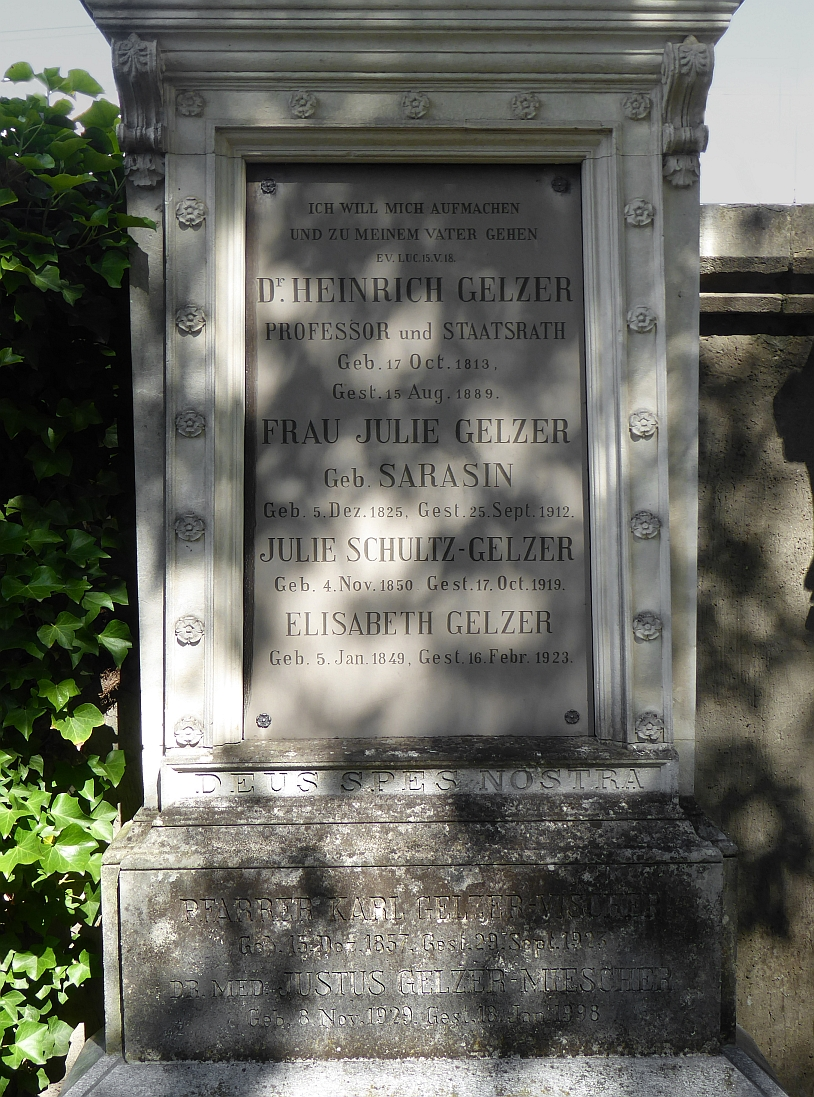 Johann Heinrich Gelzer (1813-1889) Professor der Geschichte, Staatsrat, Dr.h.c der Theologie der Universität Jena.Grab auf dem Friedhof Wolfgottesacker, Basel